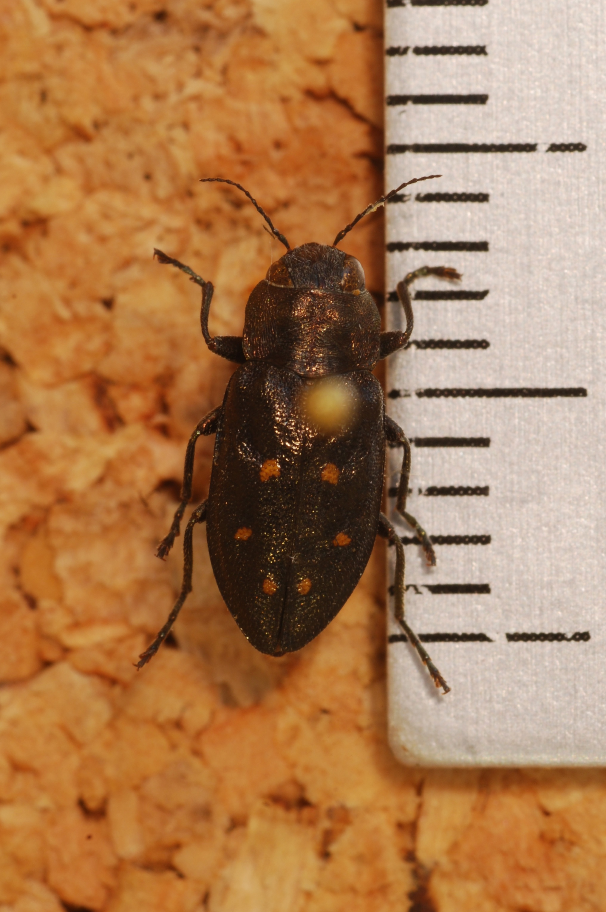 Sainte Hénédine, Dorchester, Québec, CANADA